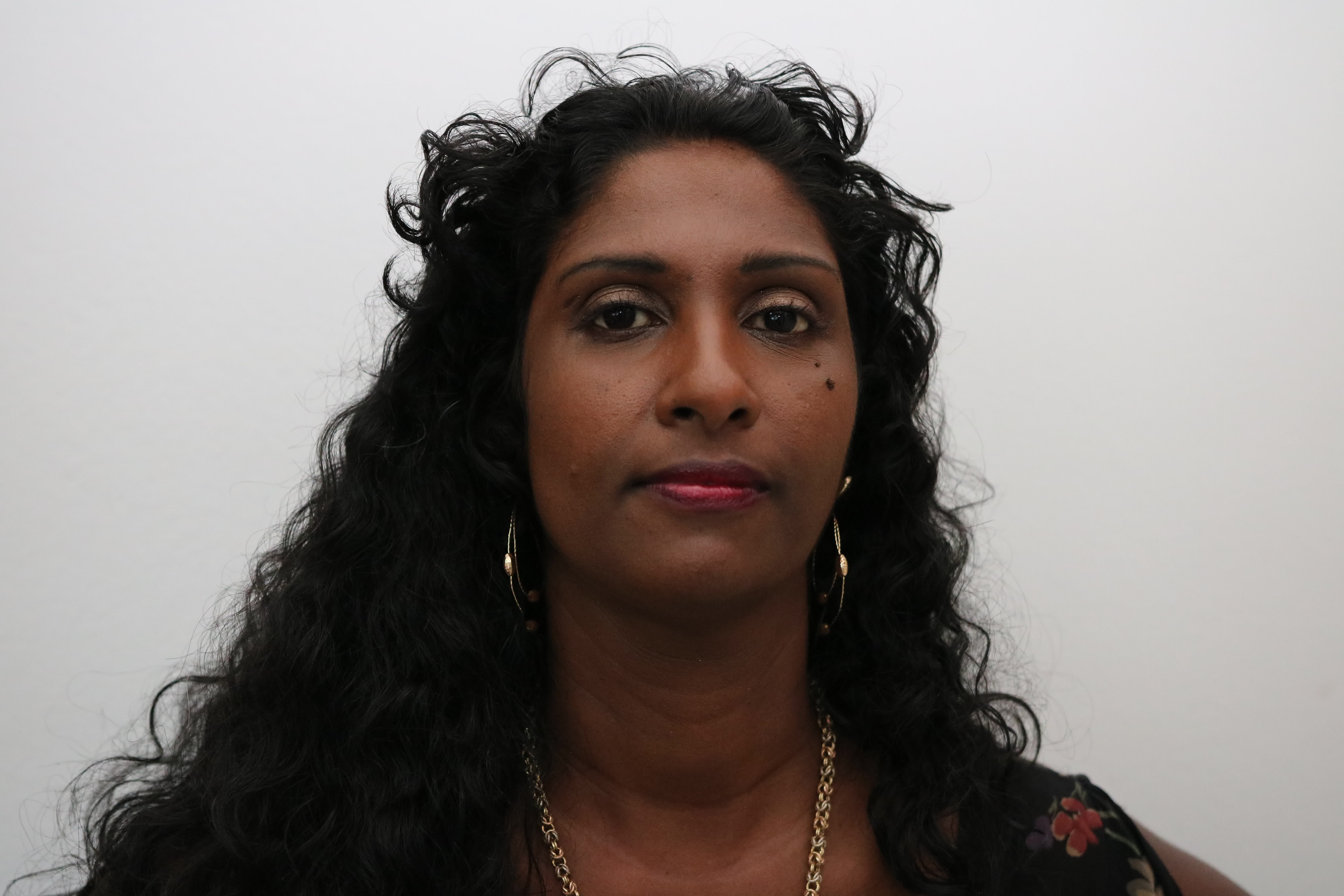 Présidente FDSEA